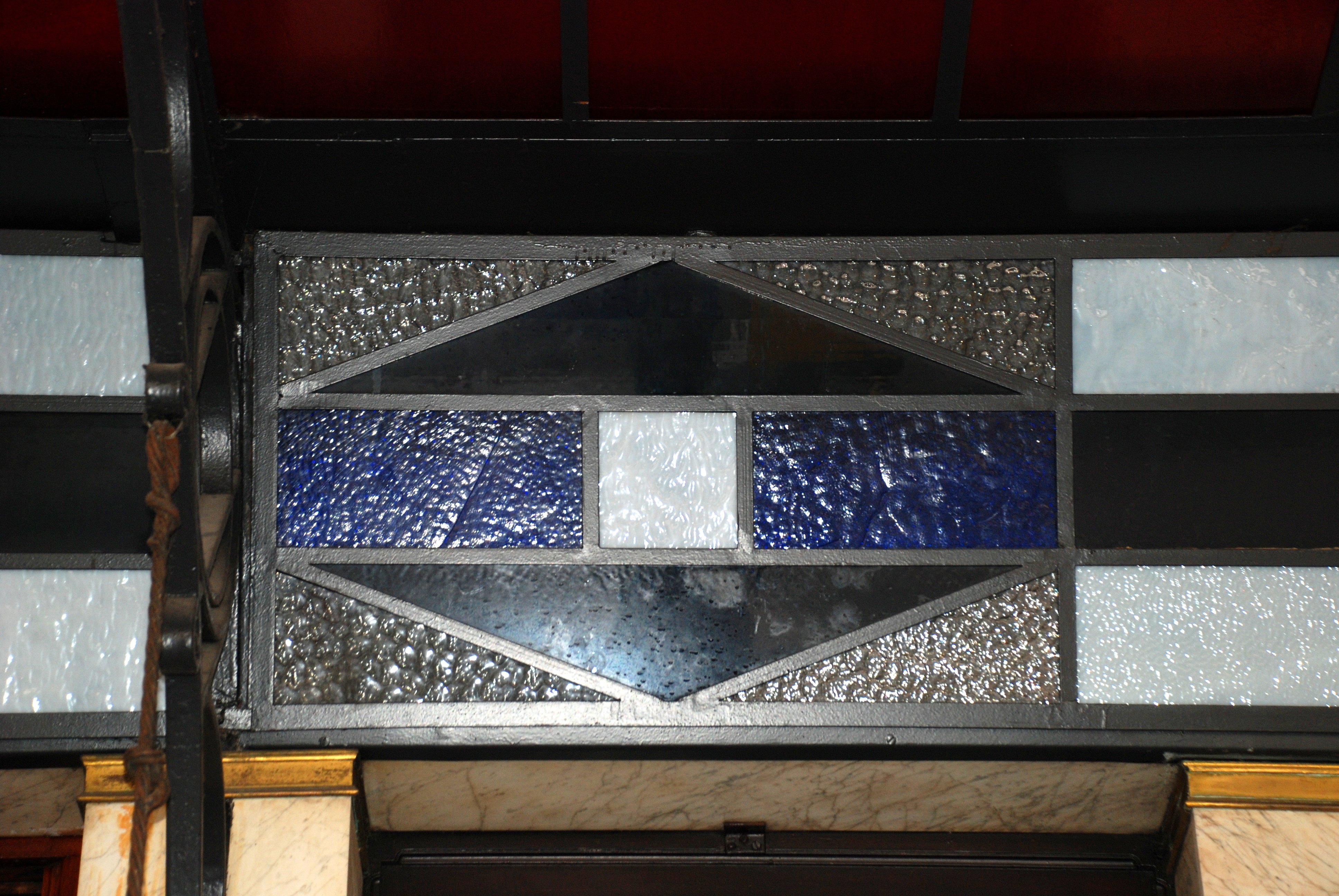 Belgique - Bruxelles - Taverne-restaurant Falstaff